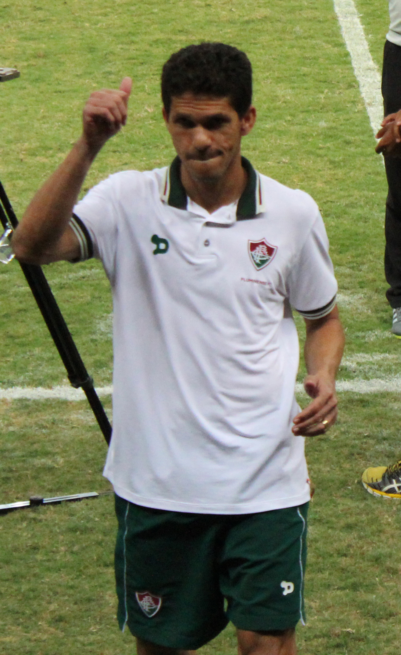 Magno Alves na partida Fluminense x Internacional, semifinal Primeira Liga, Estádio Nacional Mané Garrincha.